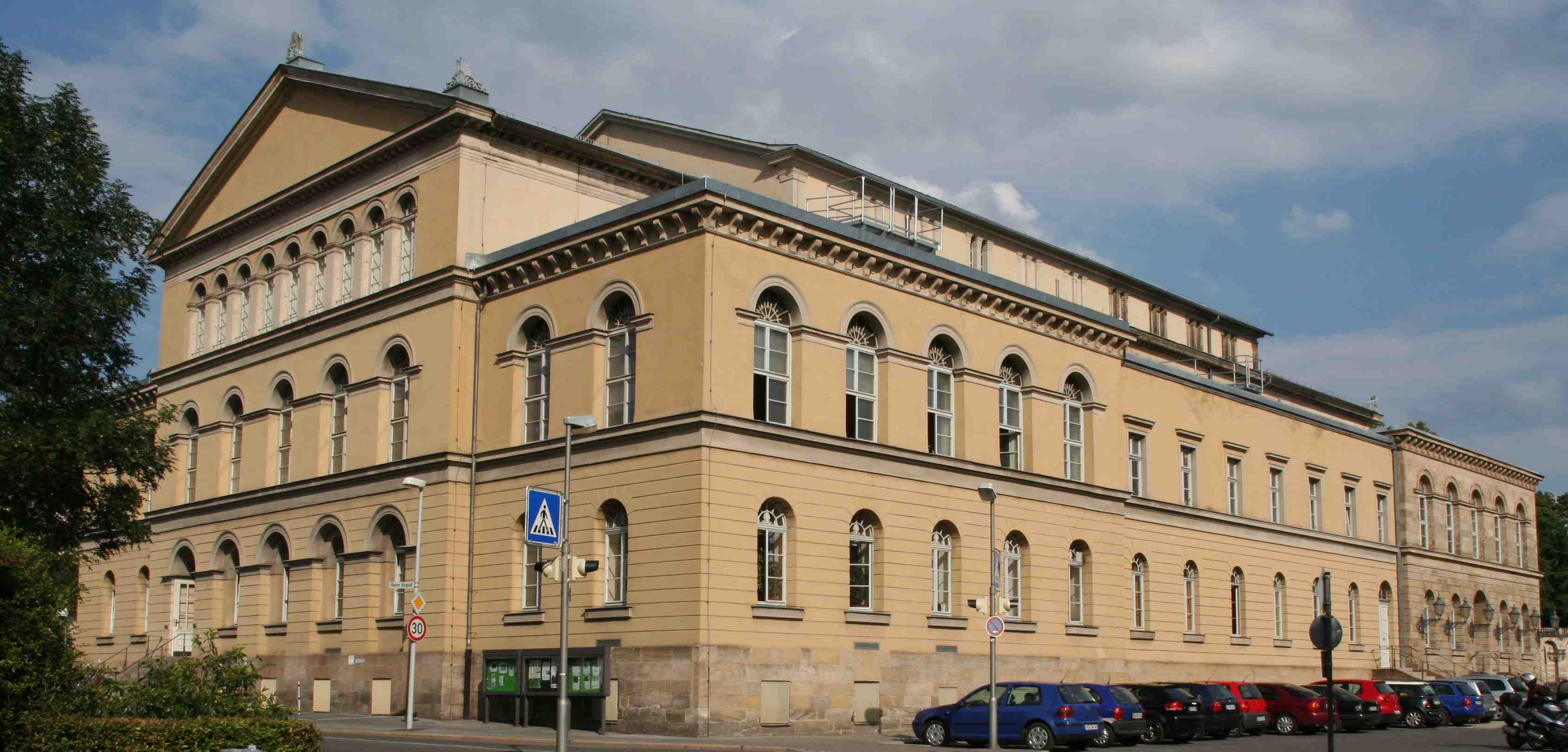 Landestheater in Coburg Rückseite von Josiasgarten aus gesehen